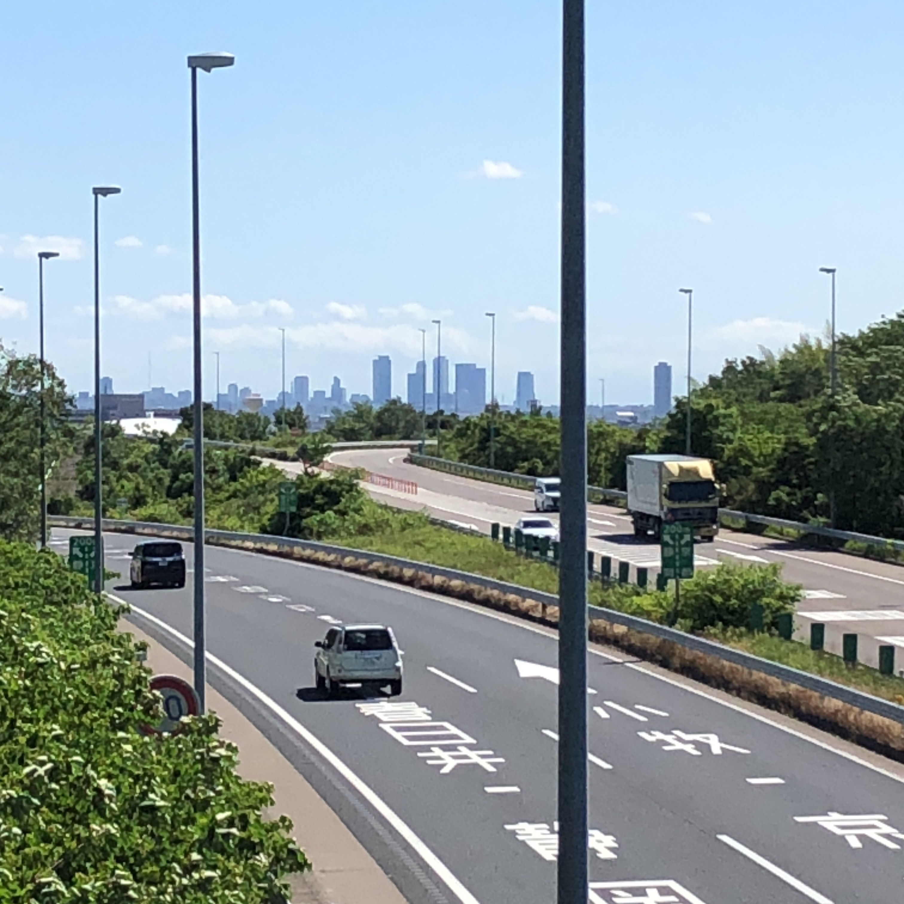 Komaki Junction002